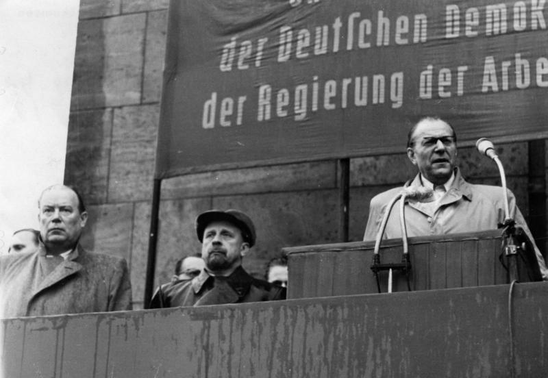 Berlin, Ansprache Otto Grotewohls Zentralbild/Sturm 26.6.1953 Berliner bekunden in einer Demonstration ihr Vertrauen zur Regierung. Zehntausende Berliner demonstrierten am Nachmittag des 26.6.1953 zum Haus der Ministerien in der Leipziger Strasse und bekundeten damit ihr Vertrauen zur Regierung und zur Sozialistischen Einheitspartei Deutschlands. Es sprach Ministerpräsident Otto Grotewohl. U.B.z.: Ministerpräsident Otto Grotewohl bei seiner Ansprache. Von links nach rechts: Wilhelm Zaisser, Ulbricht, Grotewohl. Abgebildete Personen: Zaisser, Wilhelm: USPD, KPD, Internationale Brigaden, SED, Minister für Staatssicherheit, 1954 Parteiausschluß, DDR (GND 124095615) Grotewohl, Otto: Ministerpräsident, stellvertretender Staatsratsvorsitzender, DDR Ulbricht, Walter: Staatsratsvorsitzender, Erster Sekretär des Zentralkomitees (ZK) der SED, Vorsitzender des Nationalen Verteidigungsrates, DDR